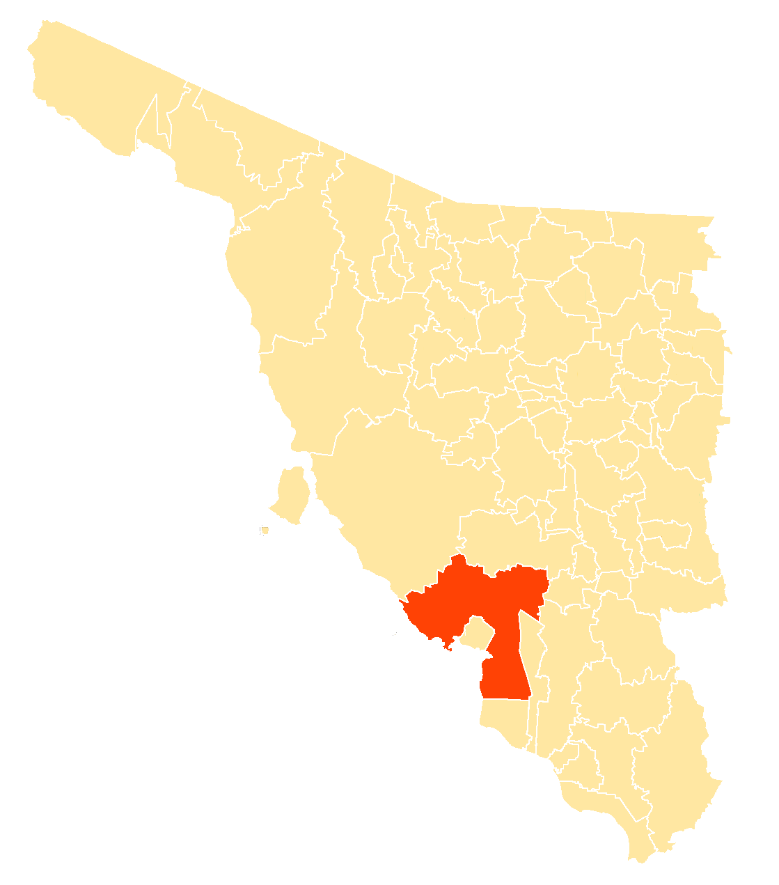 Municipio dentro de Sonora, México.